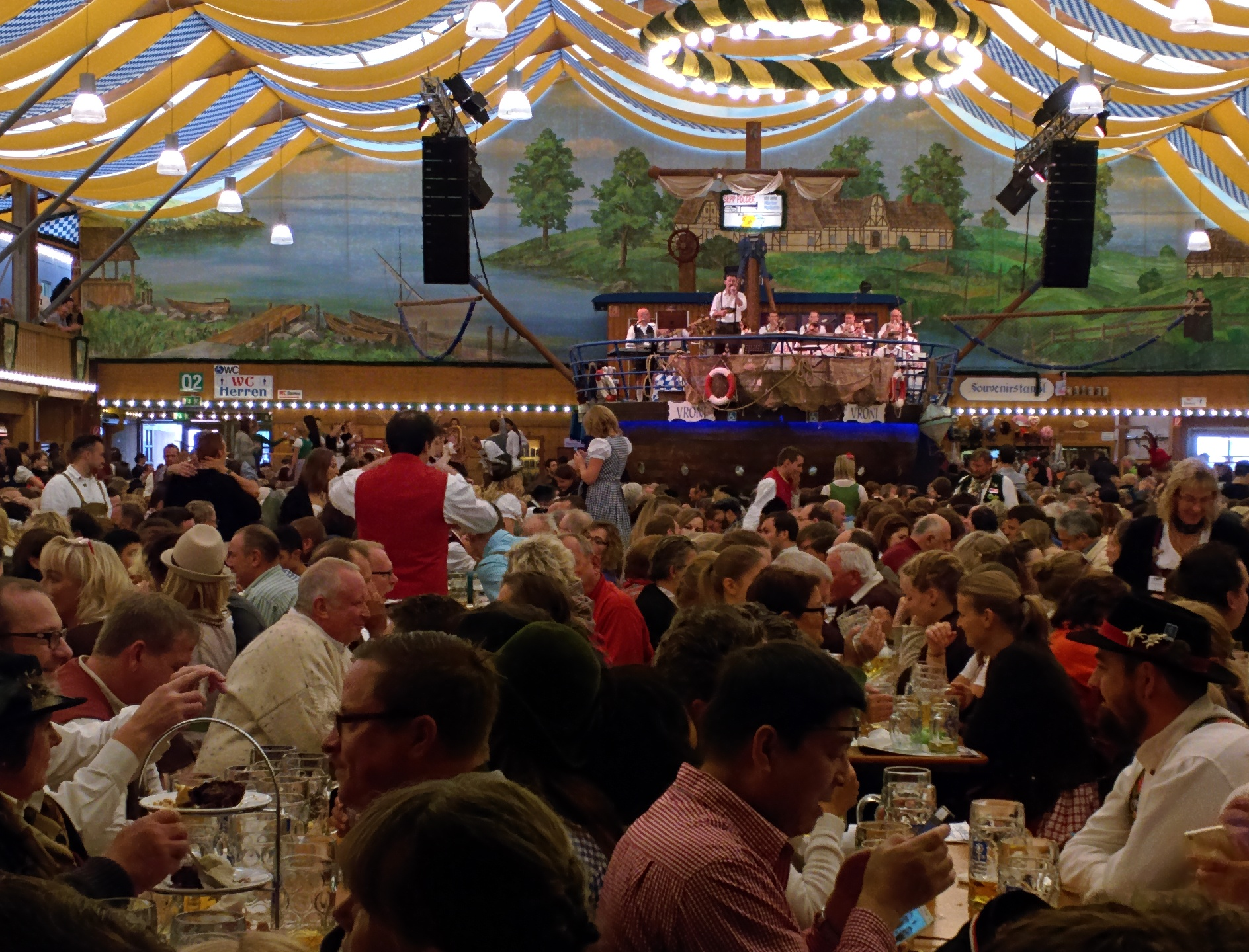 Oktoberfest